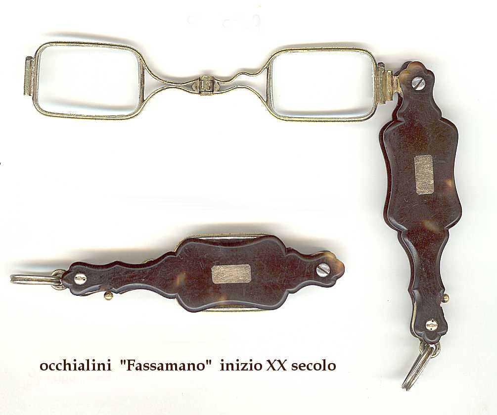 Occhialini tipo "Fassamano" in uso agli inizi del XX secolo